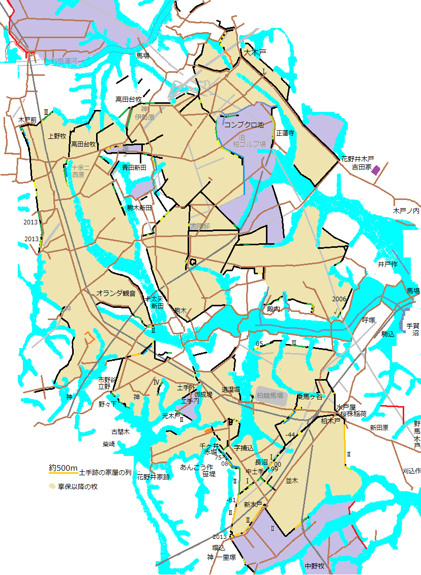 小金牧上野牧地図約100年公開の地図を目測で模写著作権クリア